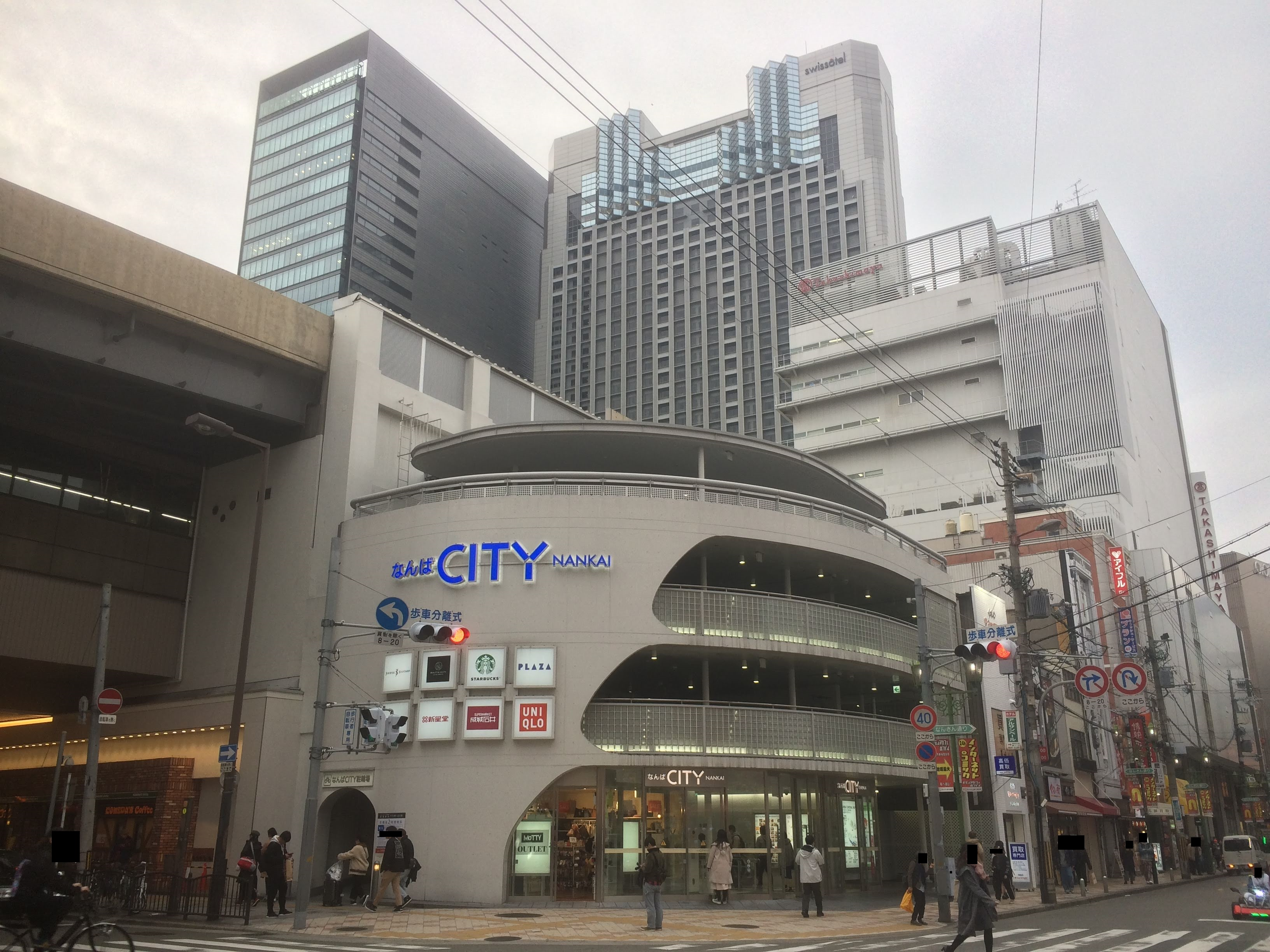 なんばCITYの建物外観（2016年の改修後）